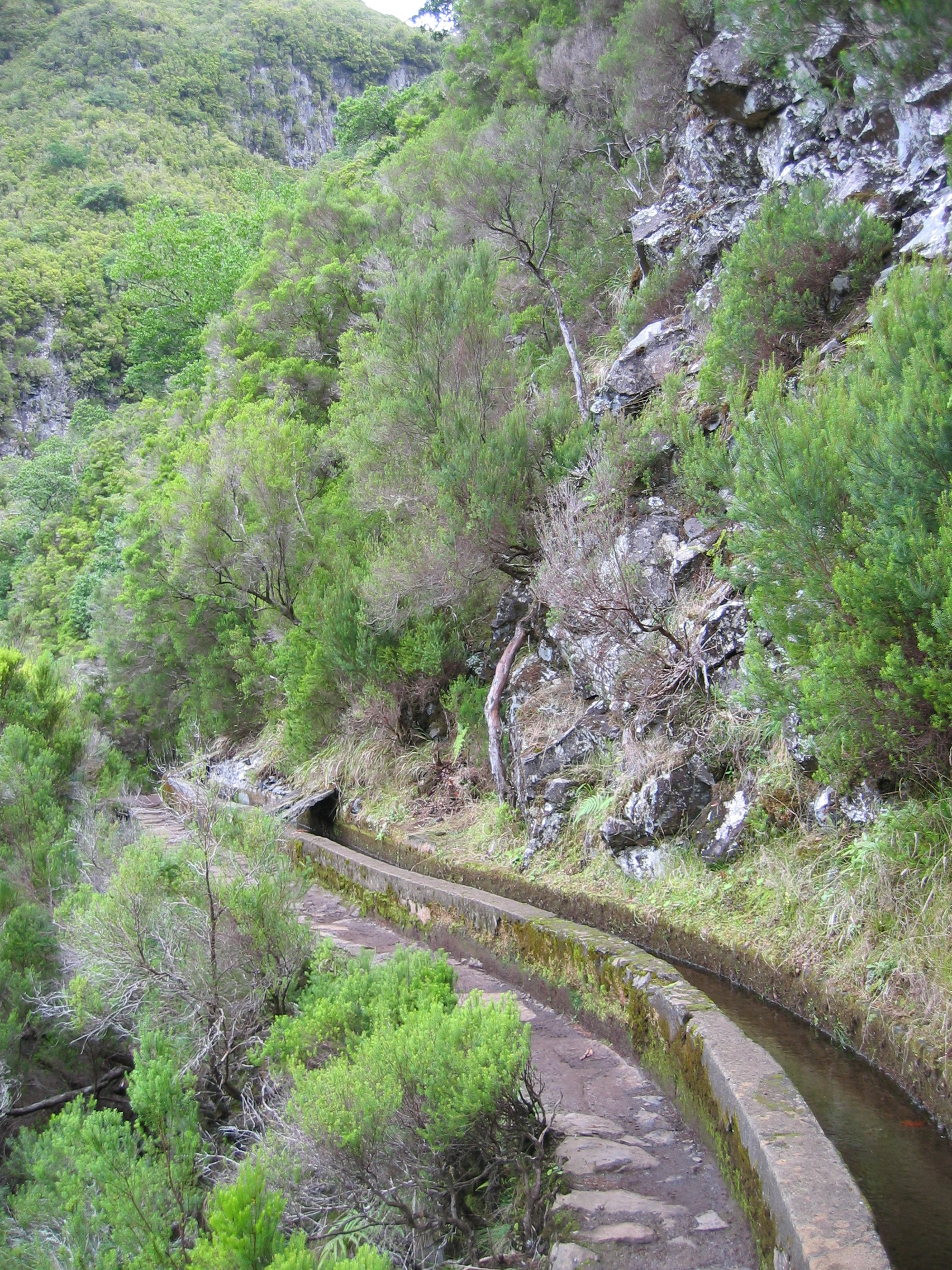 Levada op Madeira (sept 2004) Eigen foto